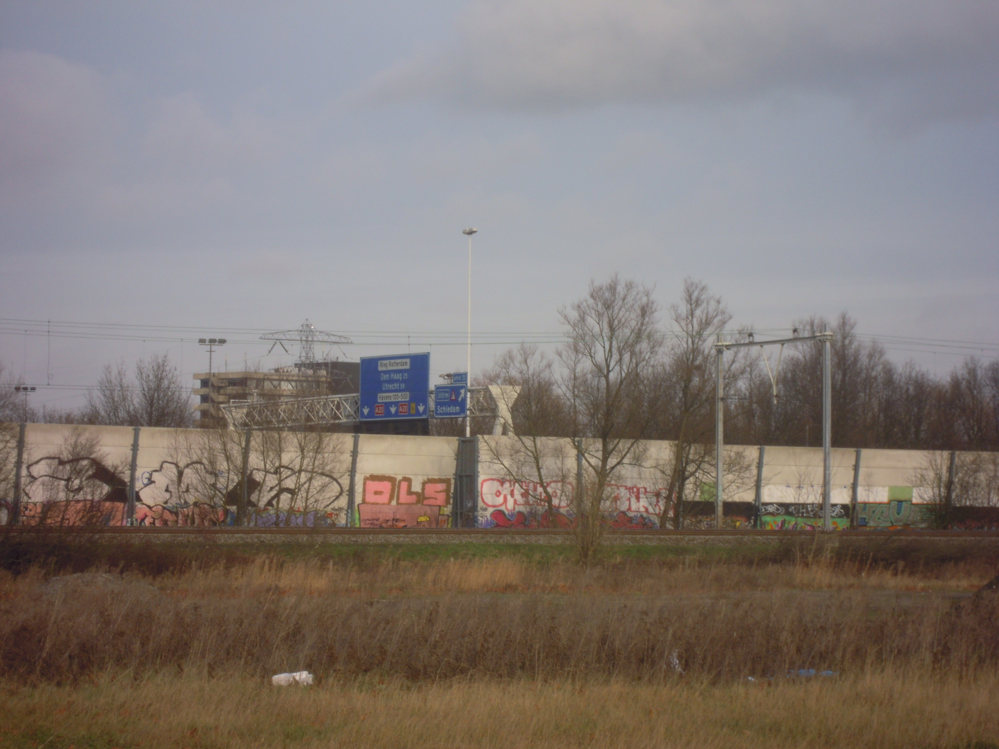 De exacte locatie waar de treinramp bij Schiedam gebeurde. Notitie: Foto werd genomen op ongeveer 51,92588, 4,39631